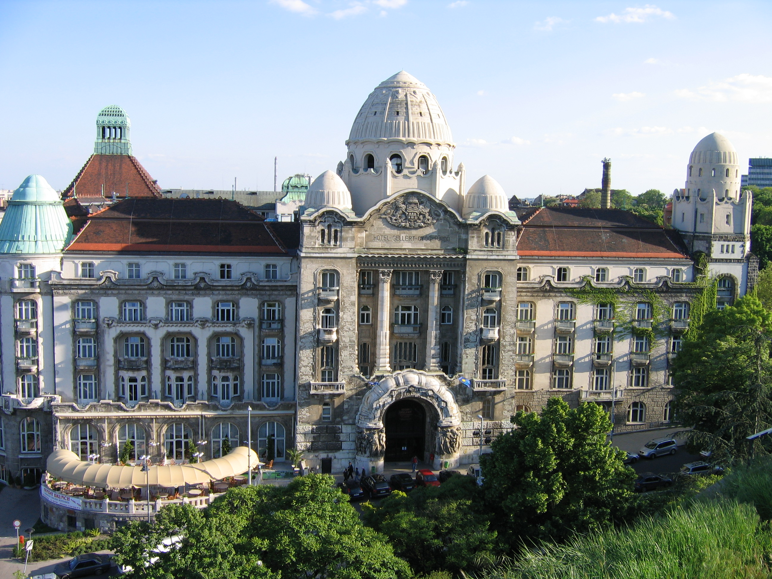 Hotel Gellért, Budapest, Hungary